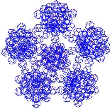 Az ikozi-ikozaéder csillag egy ötszöge a középső testtel